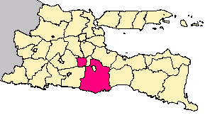 carte indonésienne